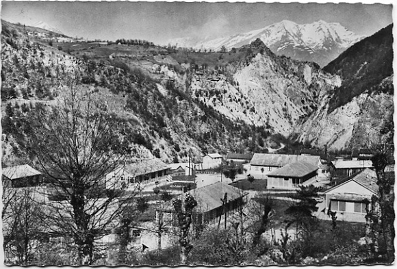 Cognet, Isère, France. La Colonie E.D.F.